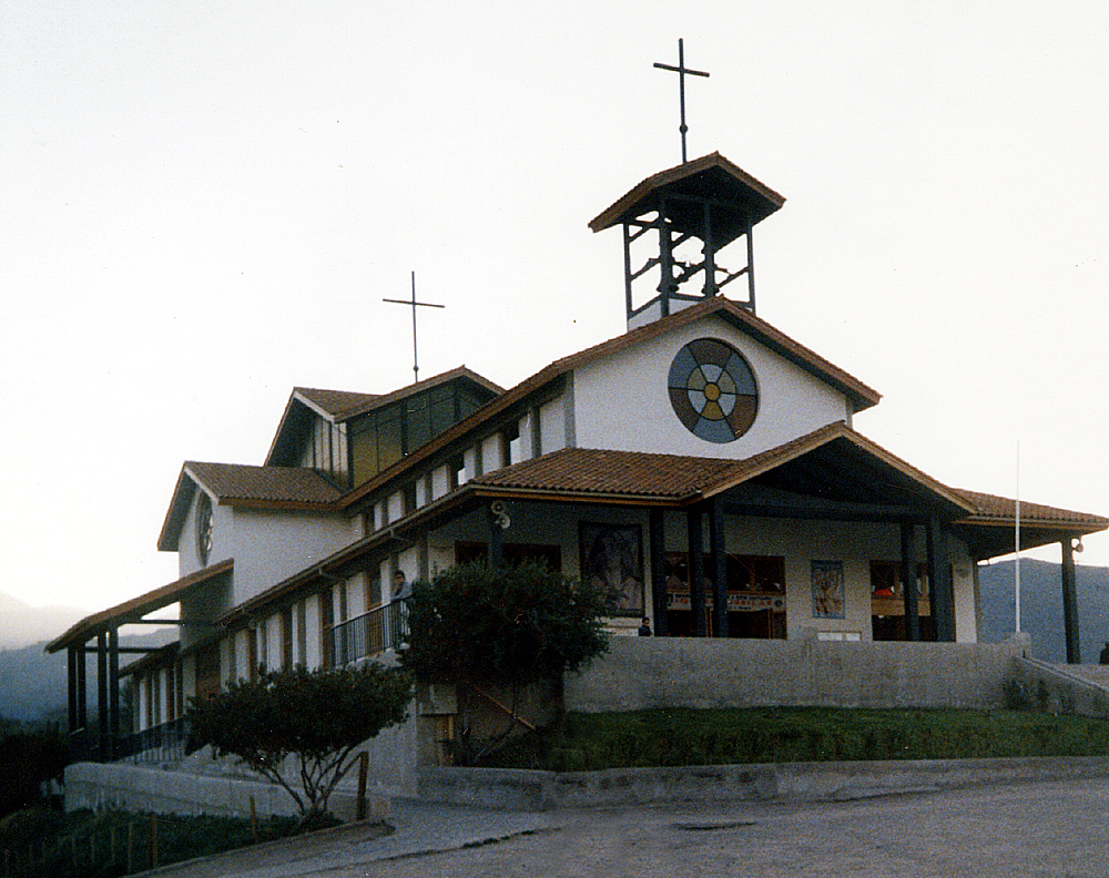 Frontis del Santuario de Santa Teresa de Los Andes, ubicado en el sector de Auco en la comuna de Rinconada, Chile.